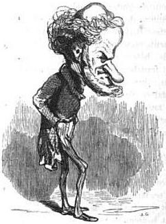 Caricature de Taschereau en 1848-49, par Cham.